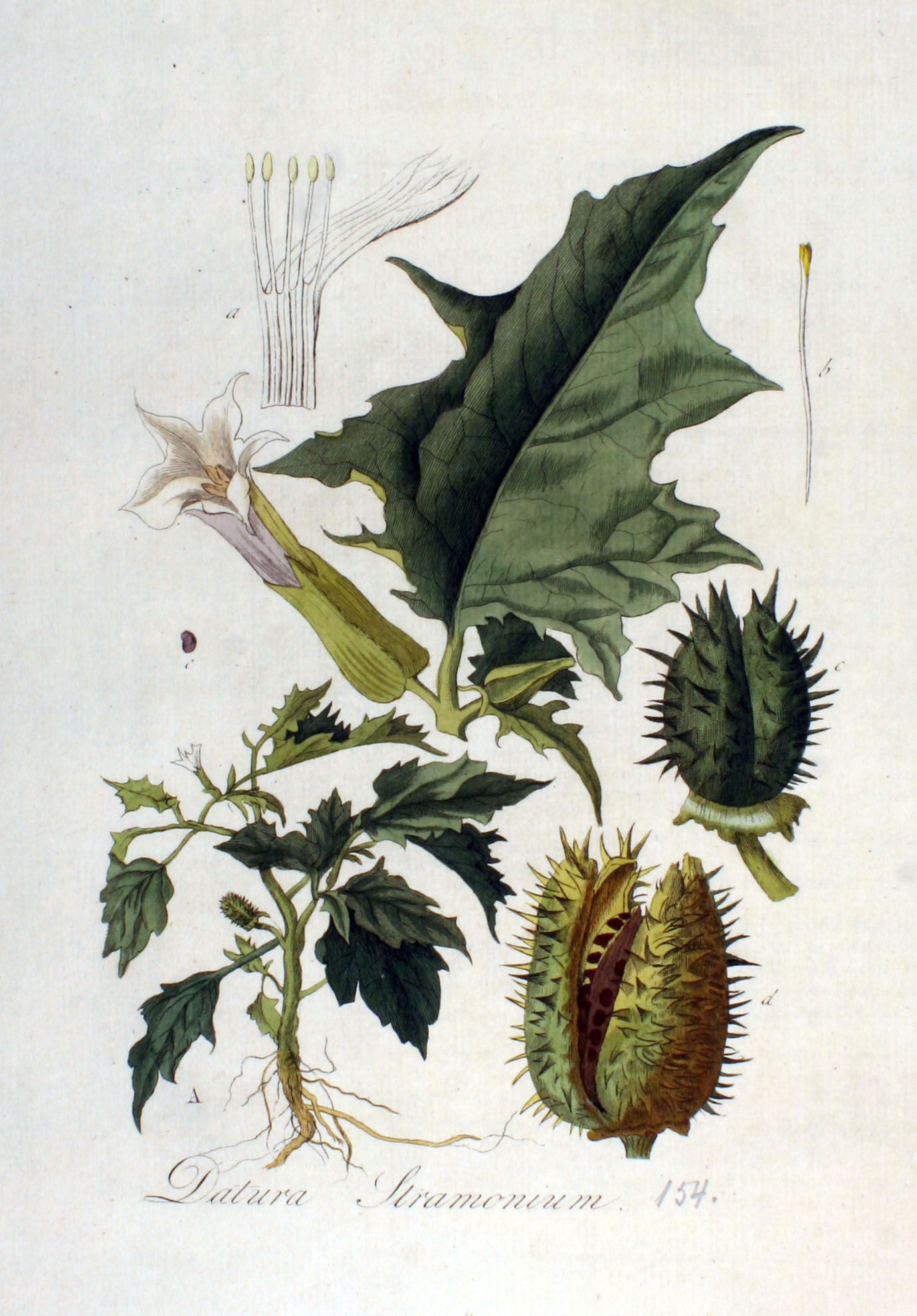 Datura stramonium